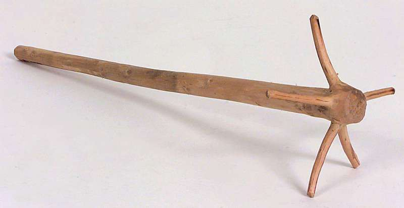 Tvare i gran laget i 1946 i Vestre Slidre i Oppland. Lengde 43 cm. Foto Anne-Lise Reinsfelt / Norsk Folkemuseum NF.1946-1207.